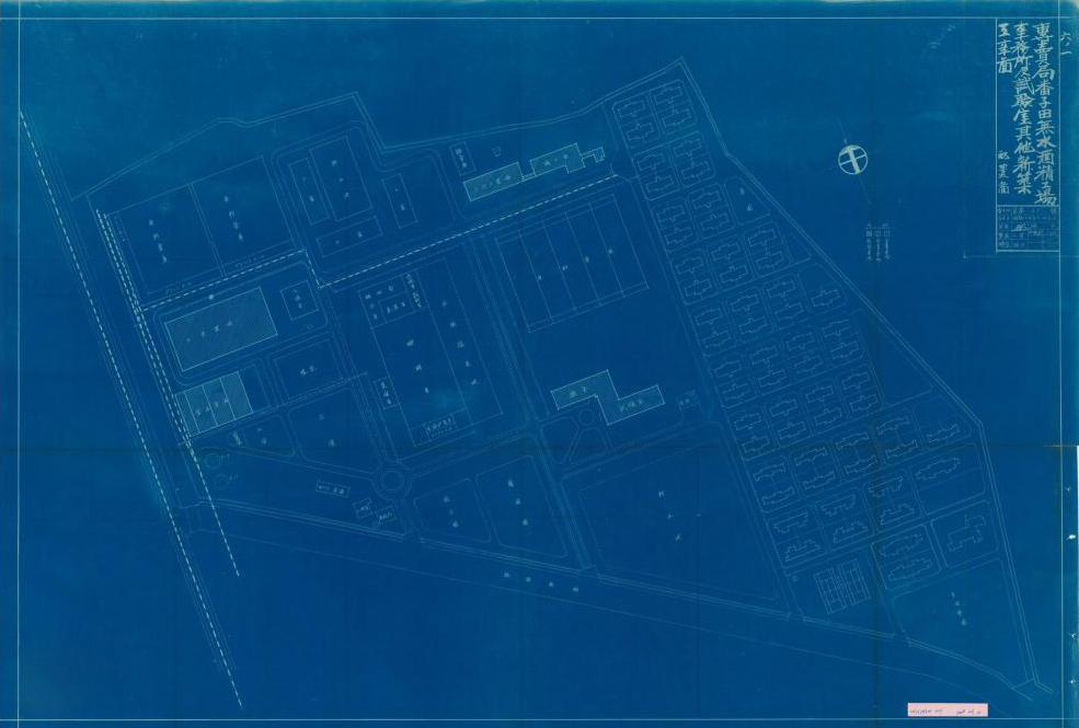 番子田無水酒精工場，為現今臺南市官田區隆田酒廠